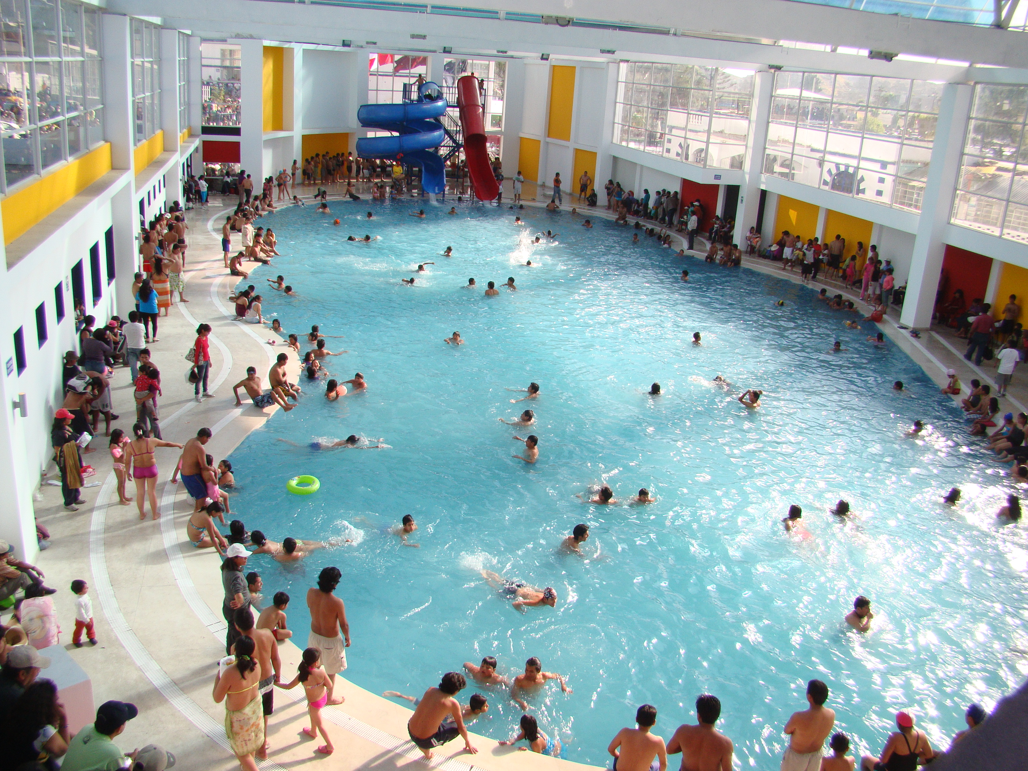 Reinauguración del balneario de Tingo.